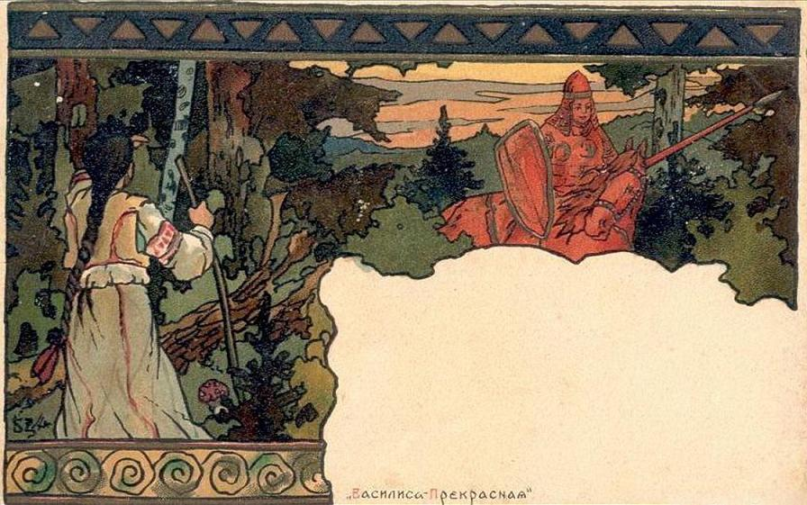 Почтовая открытка